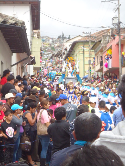 Vista de las comparsas de la ciudad de Guaranda en Ecuador por carnaval.